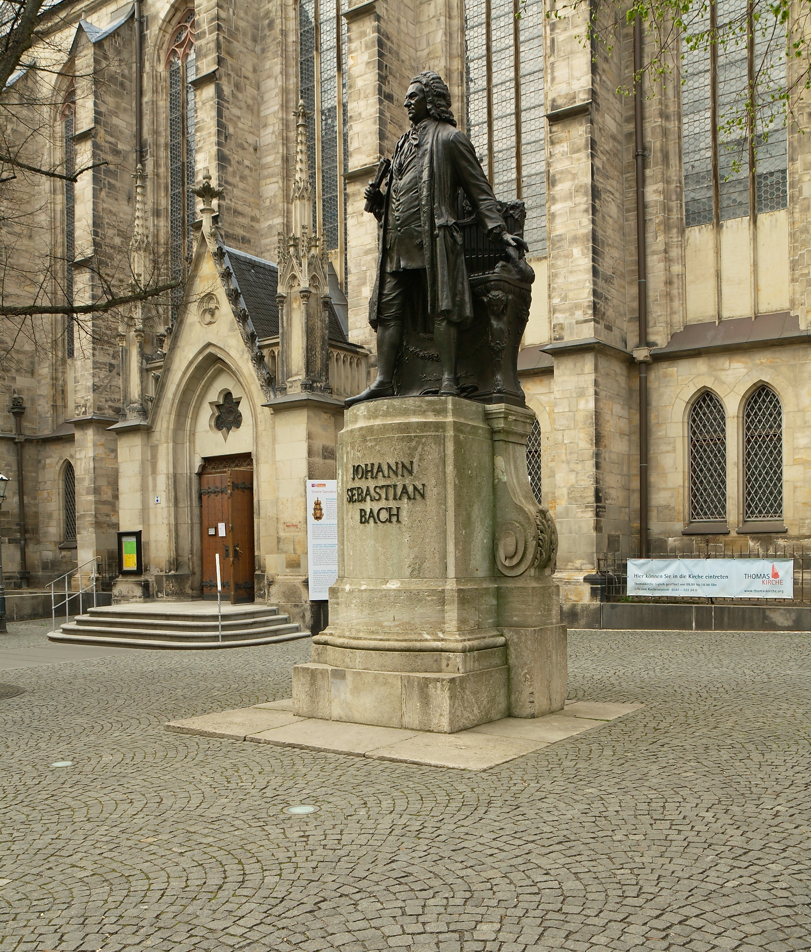 Neues Bachdenkmal in Leipzig